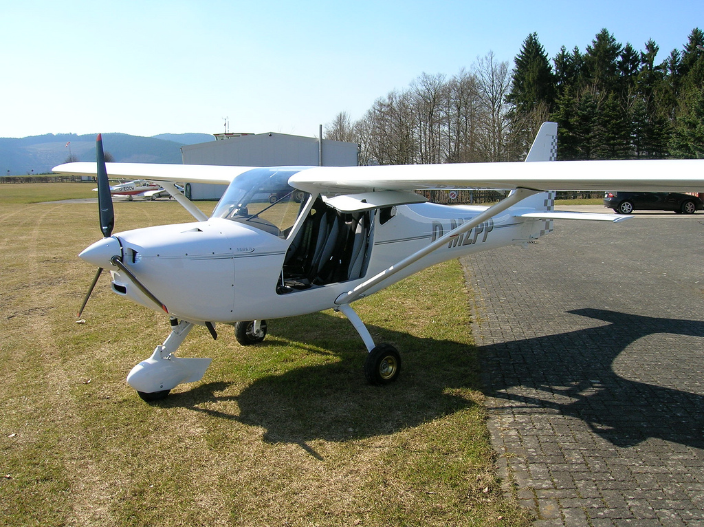 B&F FK 9 MarkIV shortwing at german airfield Schmallenberg-Rennefeld